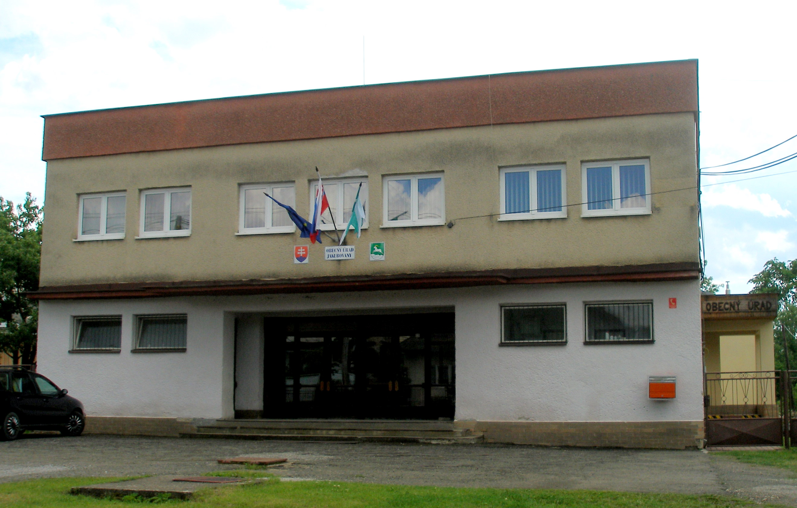 Obec Jakubovany okres Sabinov.